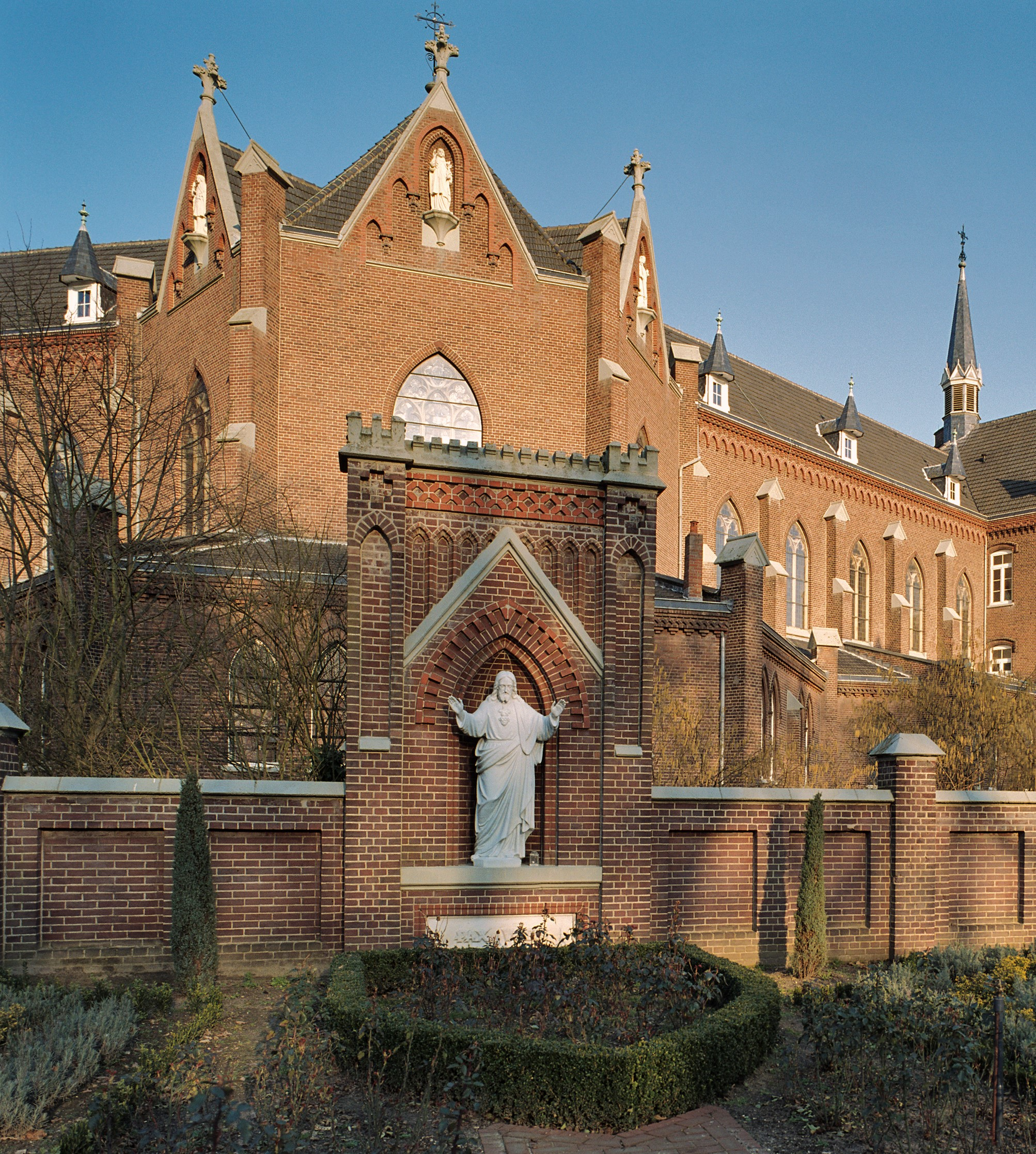 Heilig Hartklooster van de Missiezusters van Steyl: Heilig Hartbeeld bij zuidwestelijke kloostergevel.